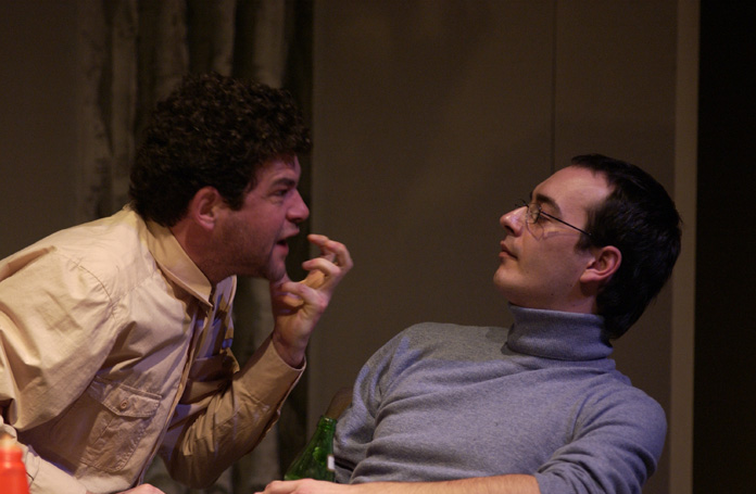 Nebojša Glogovac i Damjan Kecojević u predstavi Hadersfild